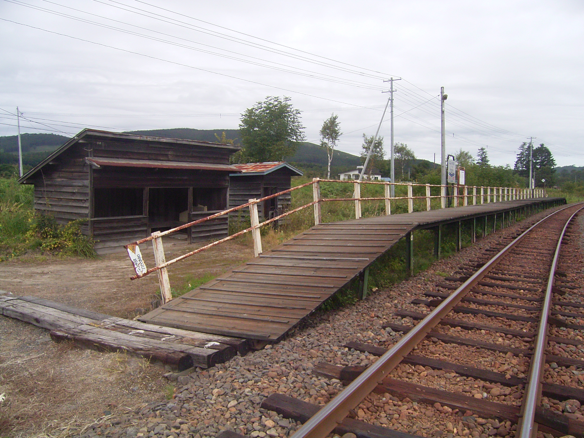 待合室とホーム